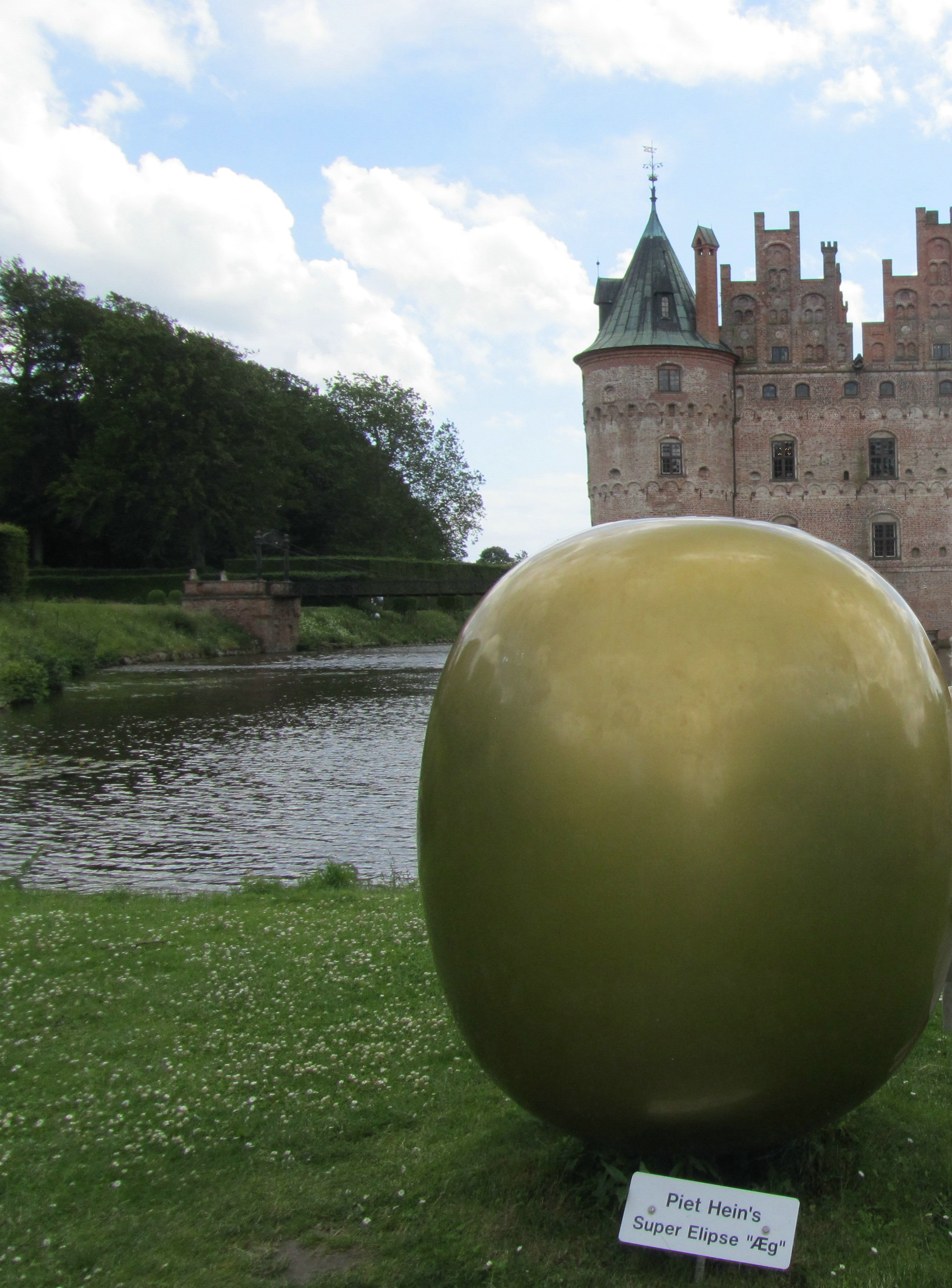 Piet Hein "Super Elipse", a. 2012, Egeskov(Taani)